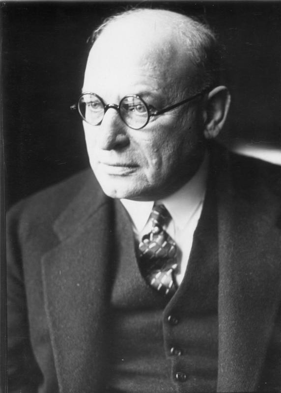 Scherl: Dr. Ing. Meinhardt Aufsichtsratsvorsitzender der Danat-Bank. Der Generaldirektor der Osram-Gesellschaft, Dr. Ing. William Meinhardt, ist zum Aufsichtsratsvorsitzenden der Danatbank gewählt worden. Keystone View Co. 18.04.1931